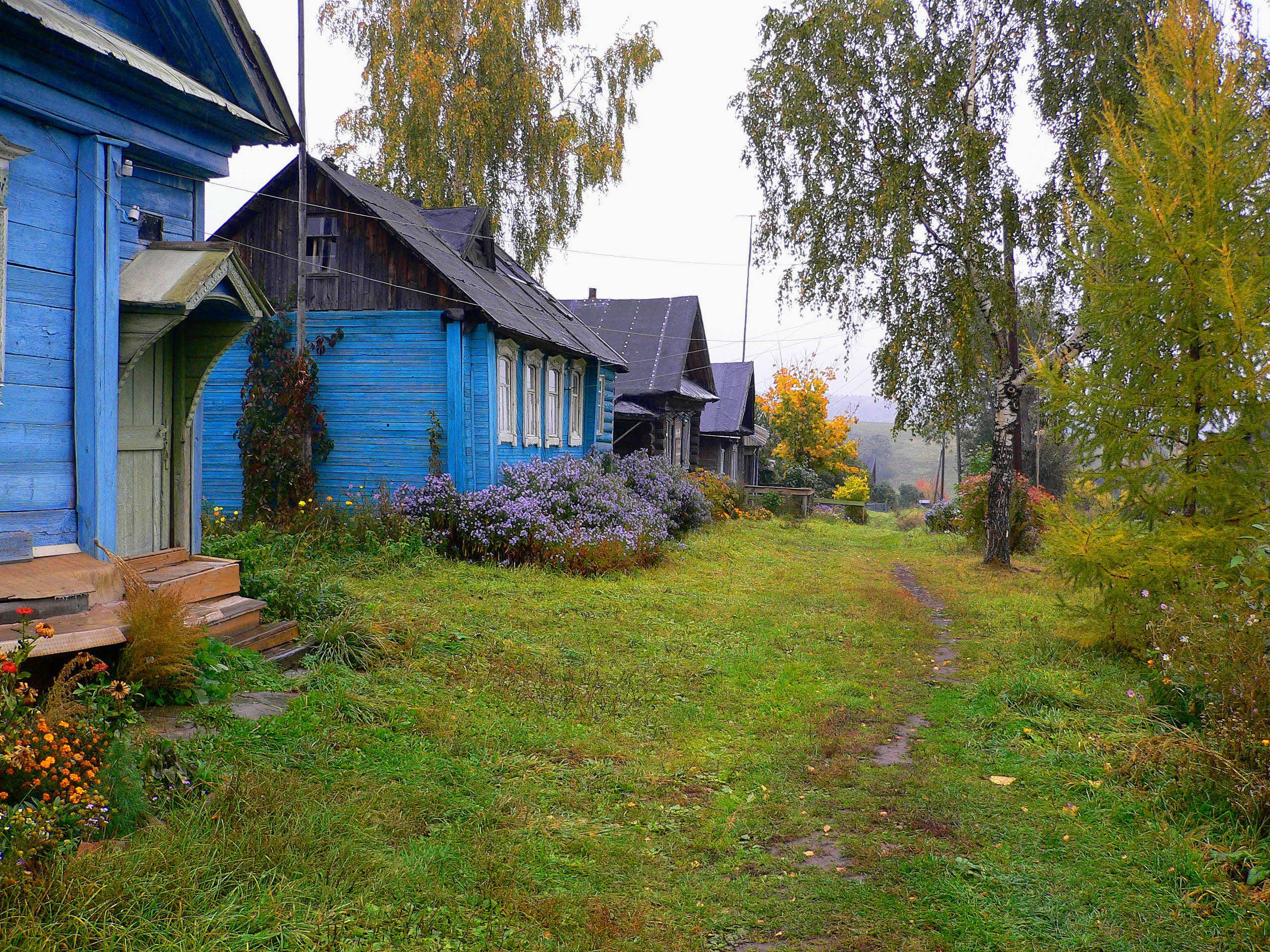 Осенняя пора